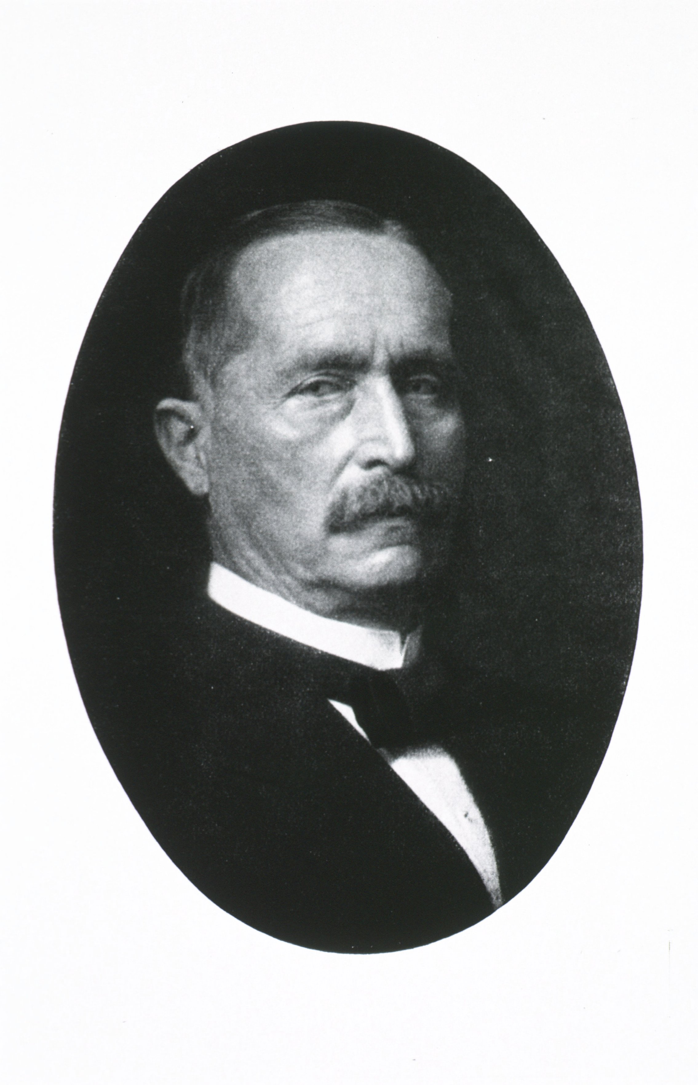 Heusner, Ludwig (Galerie Hervorragender Ärzte und Naturforscher)